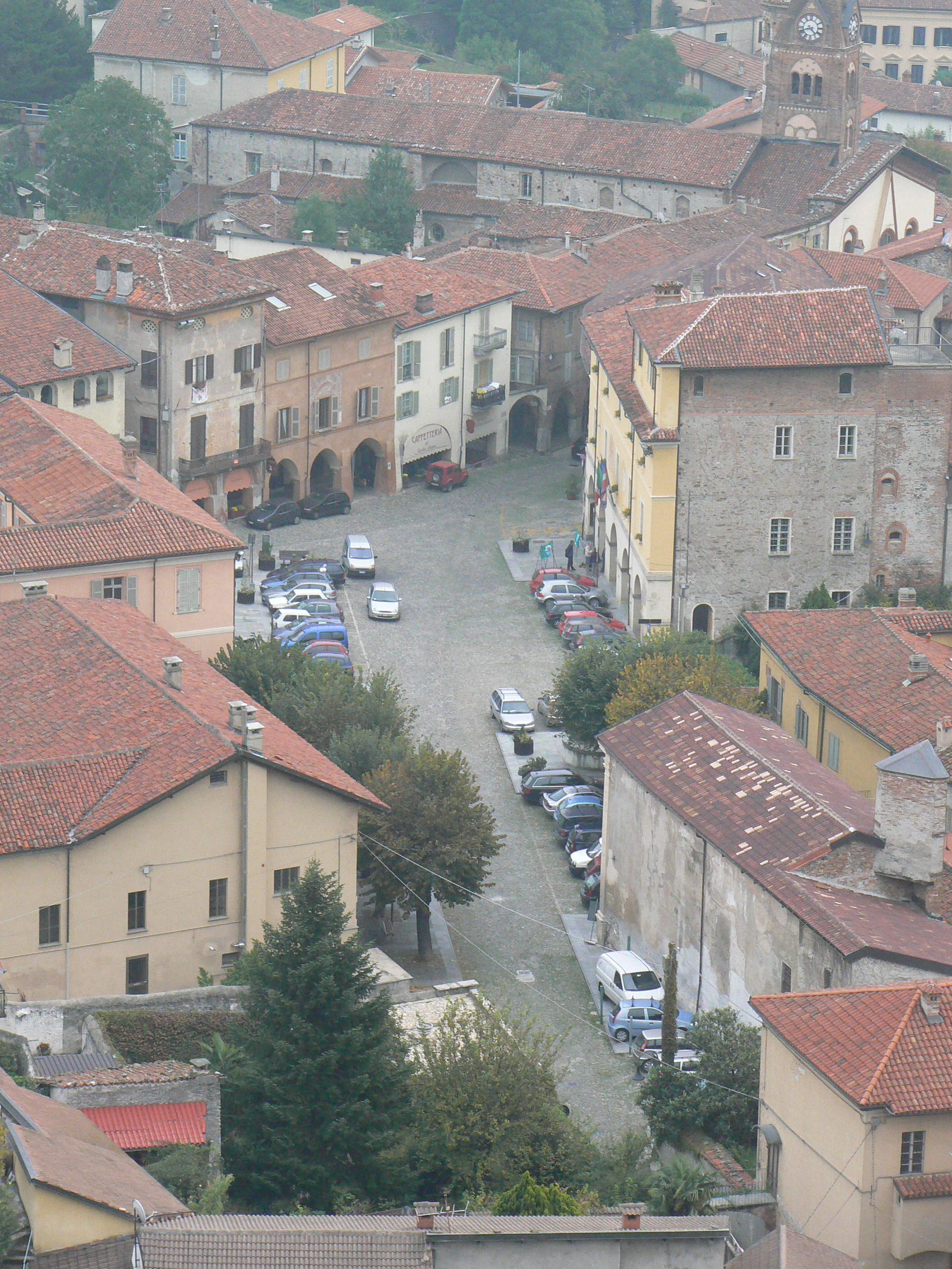 Piazza Conte Rosso nel Centro Storico di Avigliana vista dal Castello